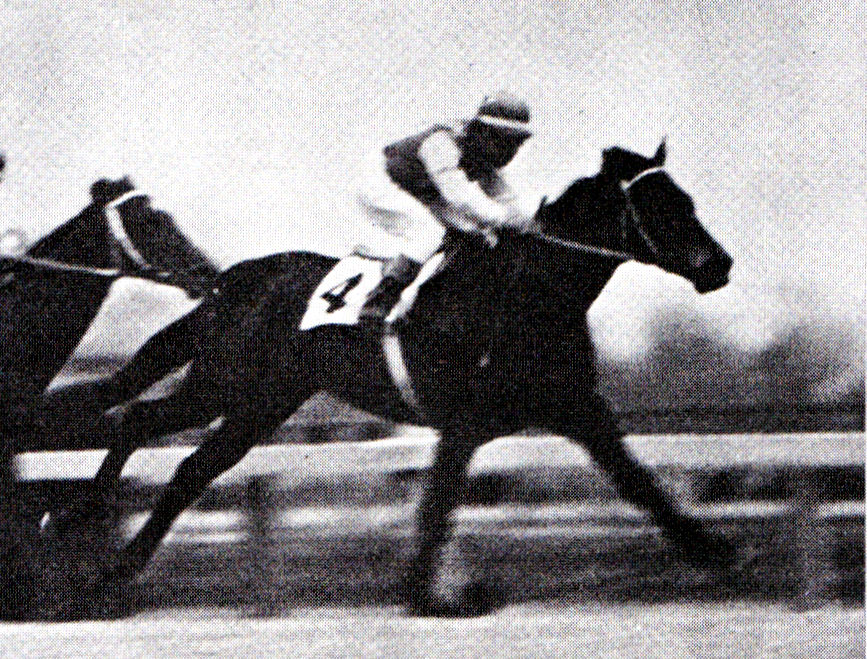 1963年東京記念（グレートヨルカ）